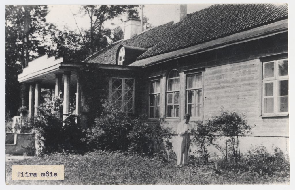 Piira mõis